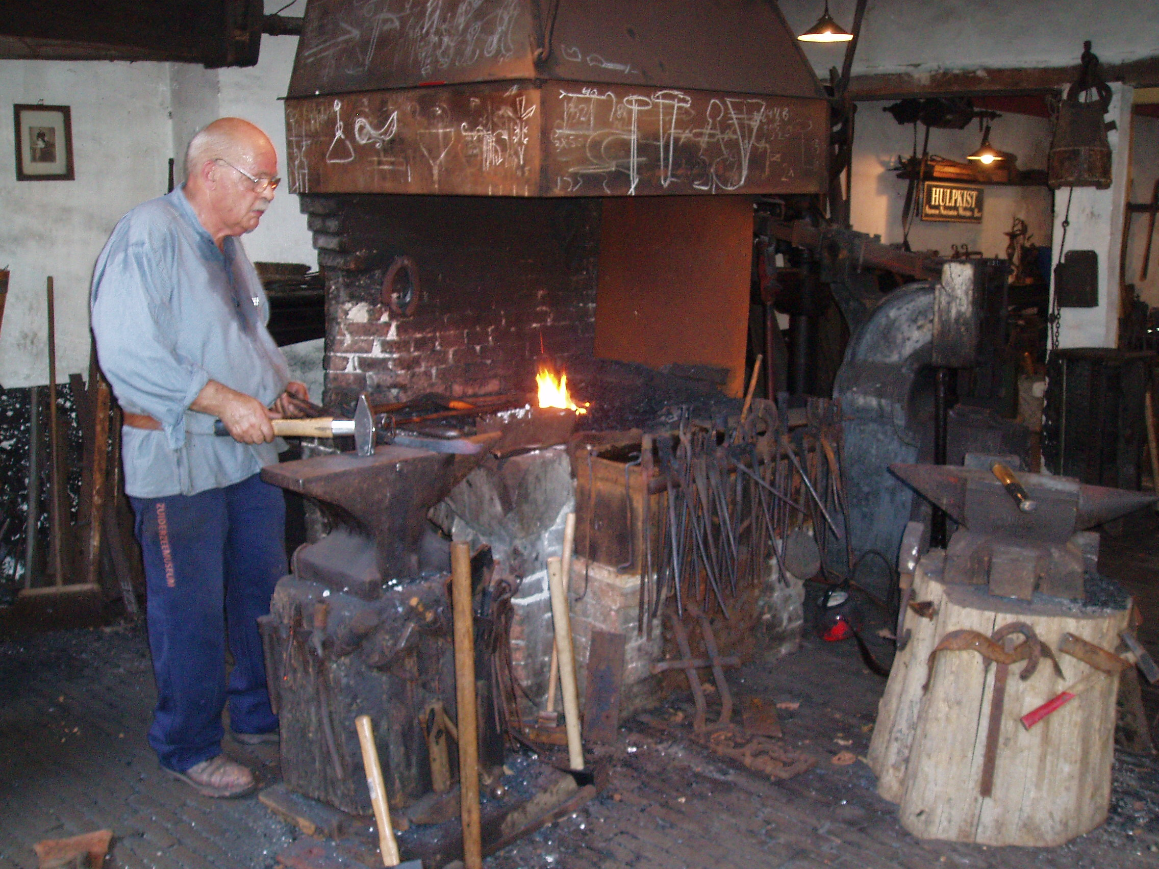 Zuiderzeemuseum in town Enkhuizen, the Netherlands